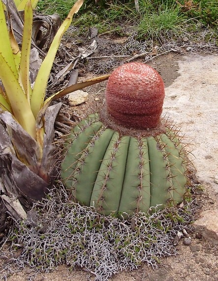 Bahia Brasil